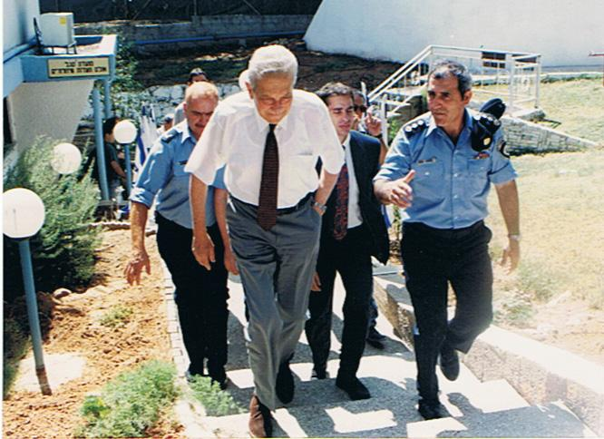 מרדכי מוטי ירושלמי, הנשיא עזר ויצמן